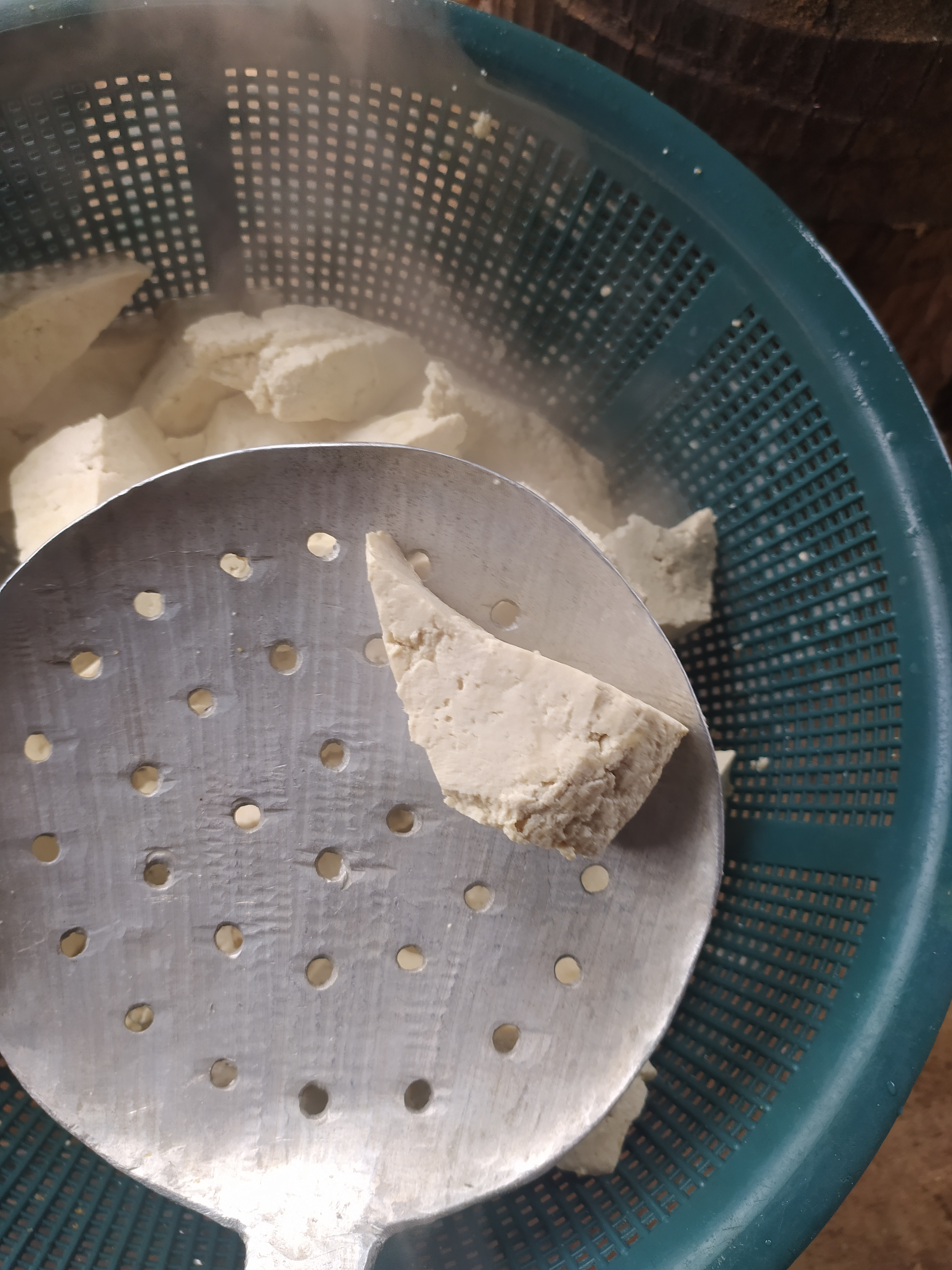 Amon Soja ou fromage de soja bouillir sur le feu.